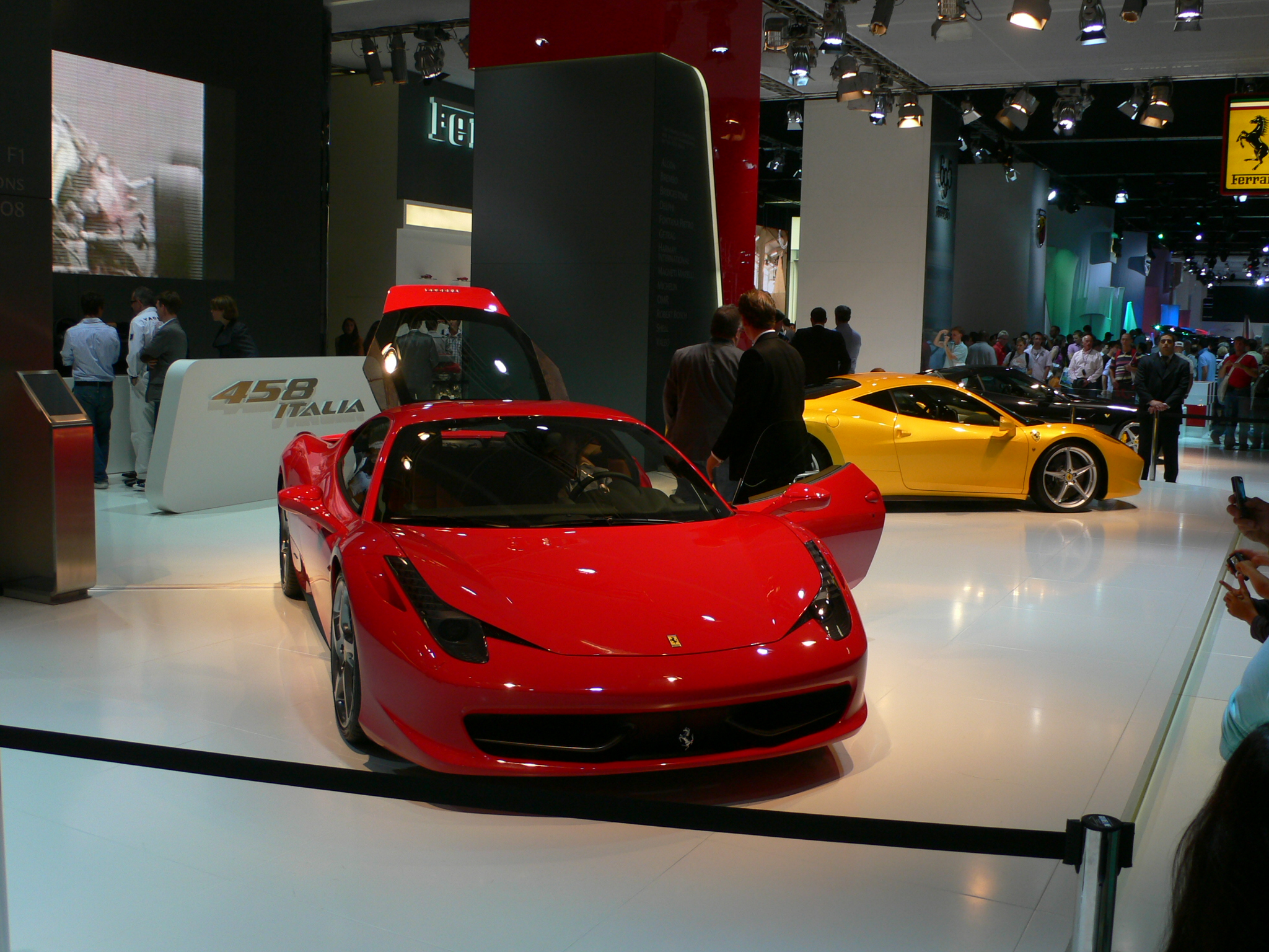 Stand Ferrari au Salon de Francfort 2009 : deux Ferrari 458 Italia y sont présentées en première mondiale.